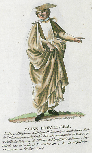 Collection de costumes de tous les ordres monastiques, supprimés à differentes époques, dans la ci-devant Belgique, Bruxelles, Philippe Joseph Maillart et sœur, 1811